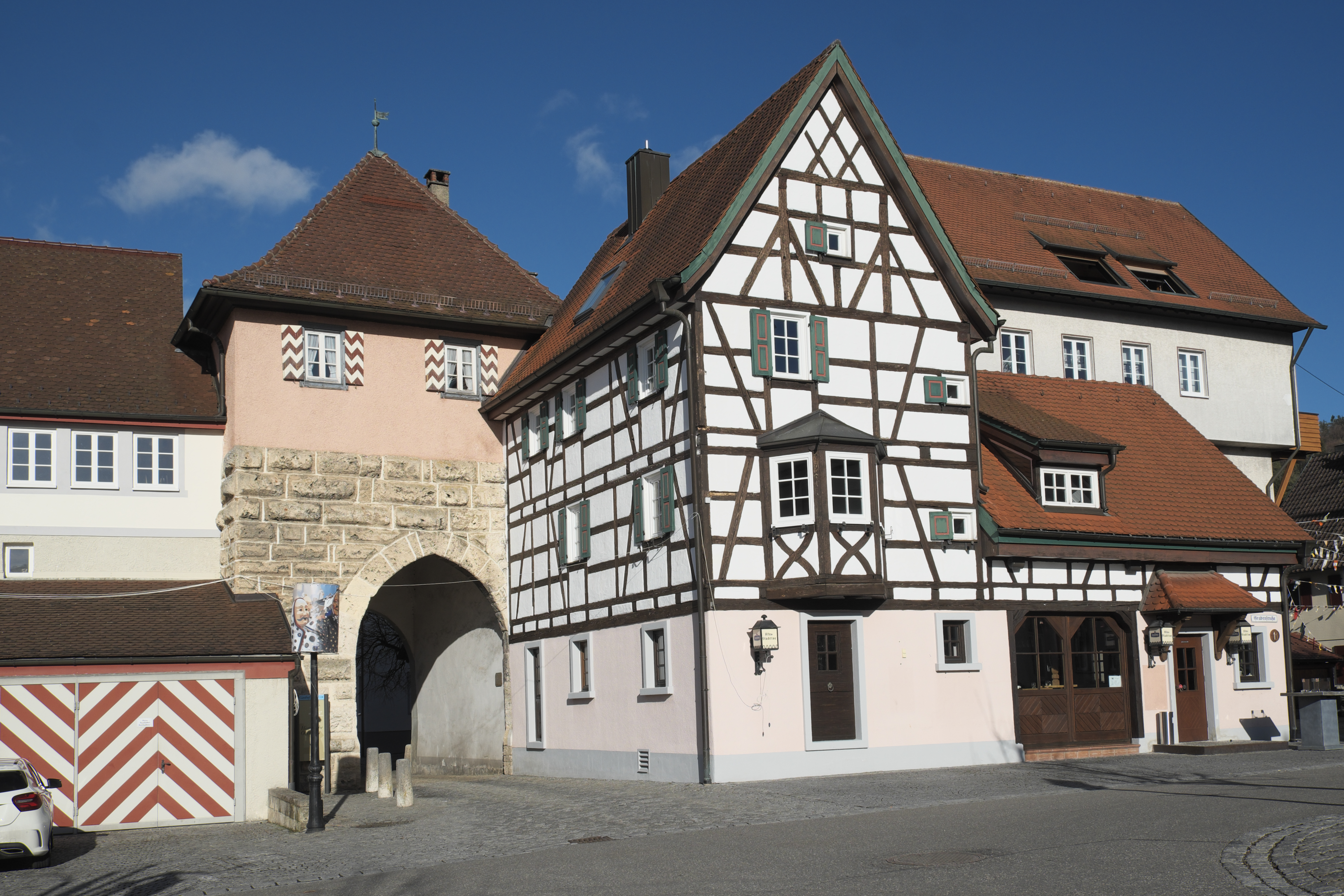 Oberes Tor und Grabenstraße 11 in Mühlheim an der Donau im Landkreis Tuttlingen (Baden-Württemberg/Deutschland)